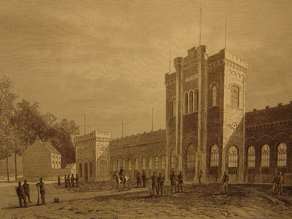 Bruxelles: le Tir National par Ch. Trumper